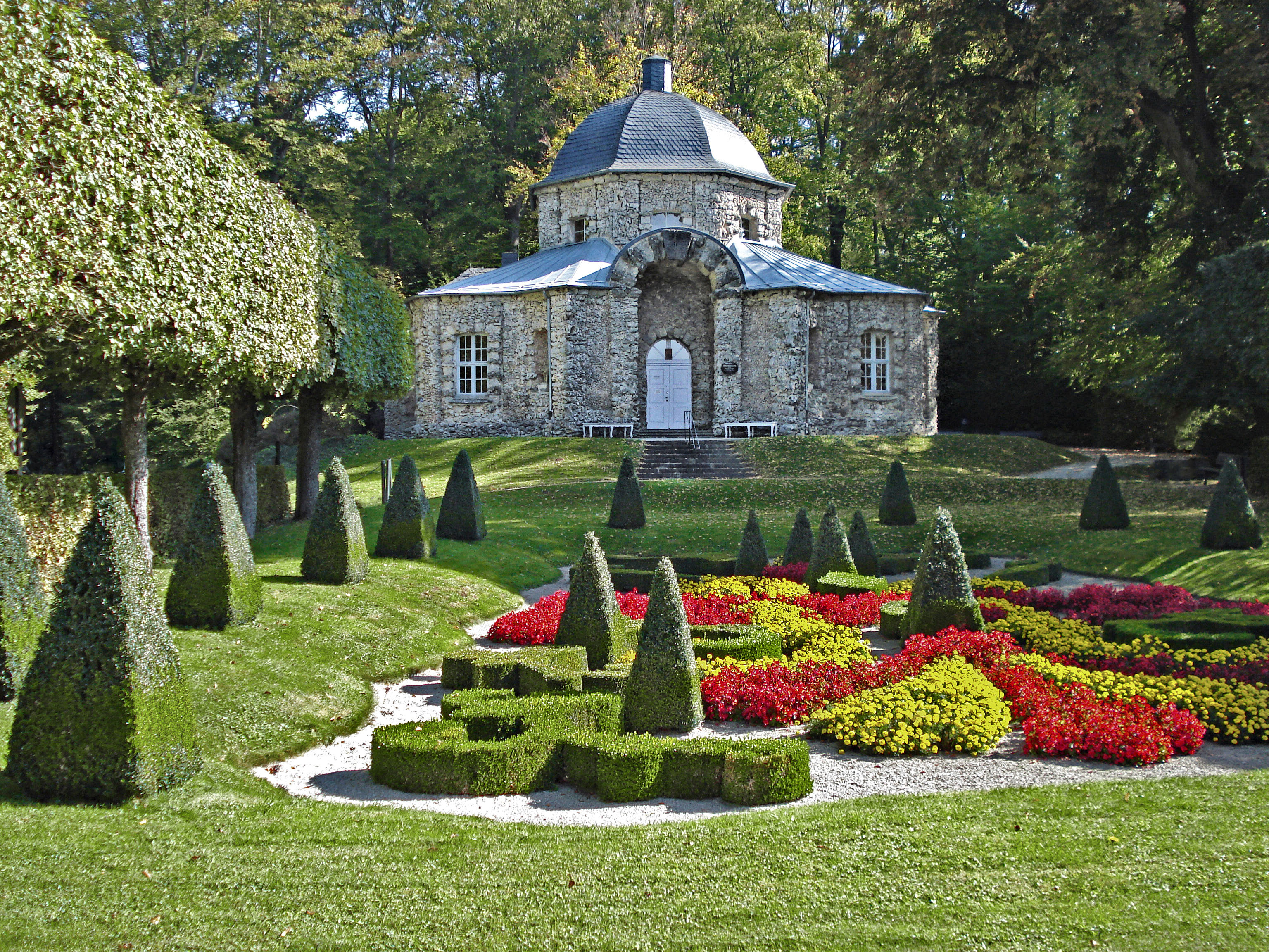 Felsengarten Sanspareil, Morgenländischer Bau